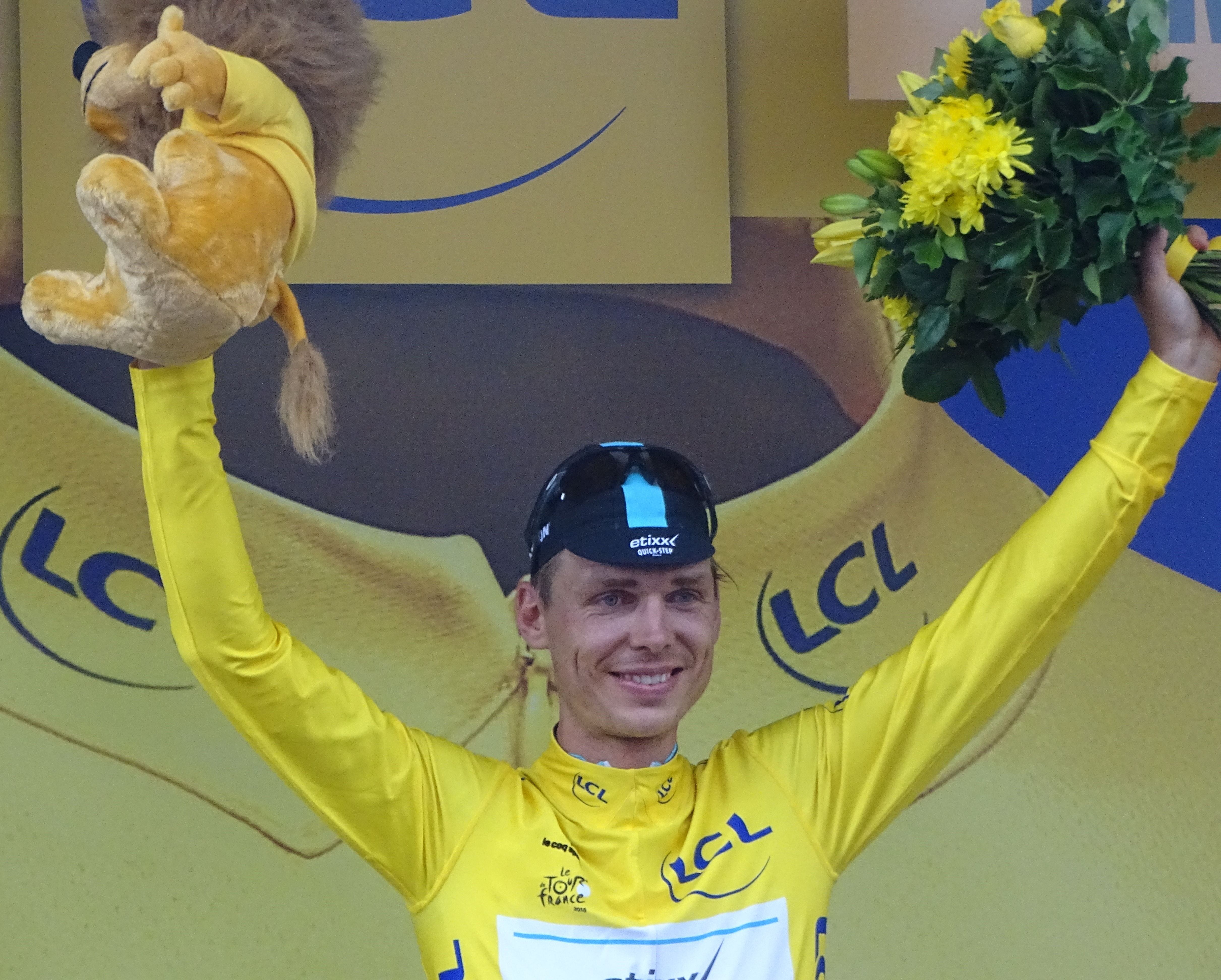 Reportage réalisé le mardi 7 juillet à l'occasion de l'arrivée de la quatrième étape du Tour de France 2015 à Cambrai, Nord-Pas-de-Calais, France.